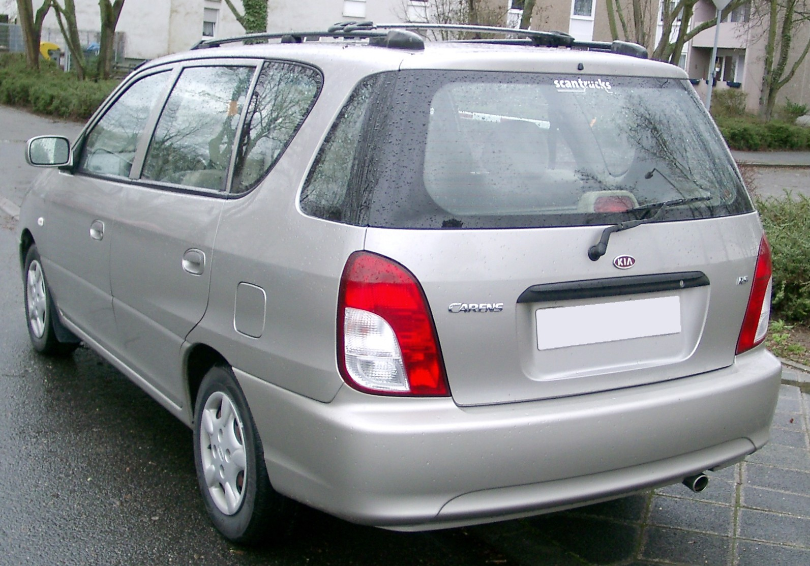 Kia Carens